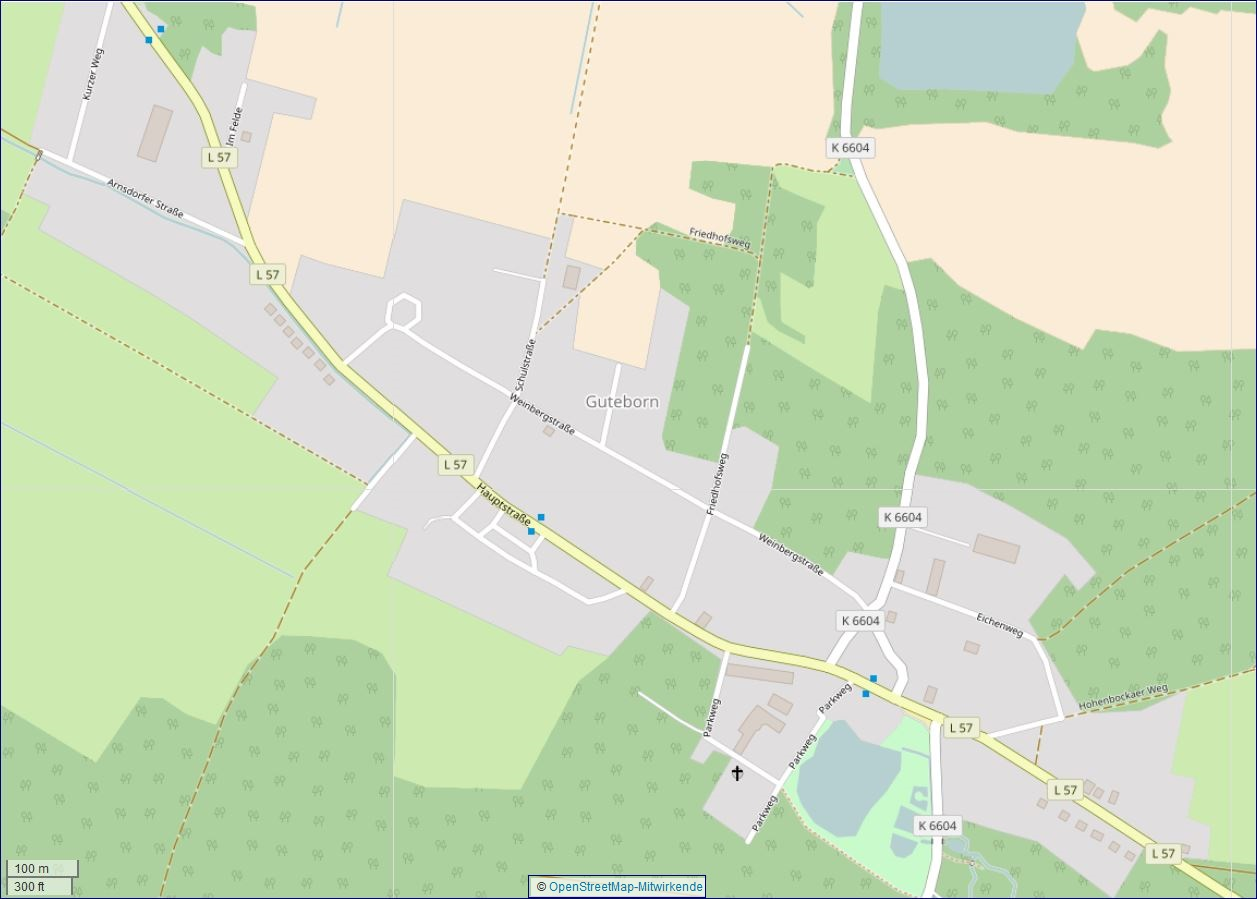 Straßen in Guteborn aus Open Street Map, Stand August 2017